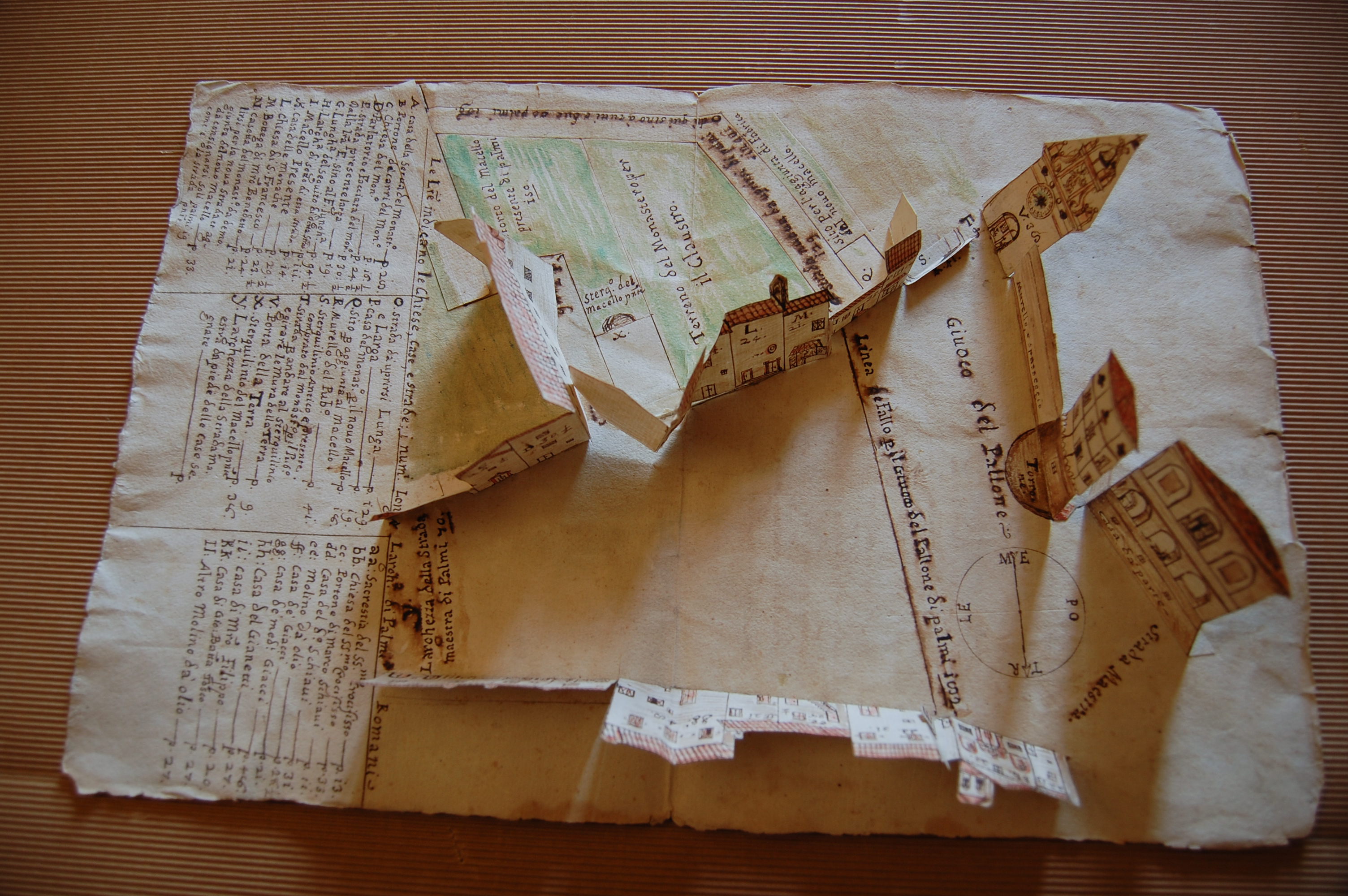 Montecarotto, piazza della vittoria in una vecchia mappa del 700.